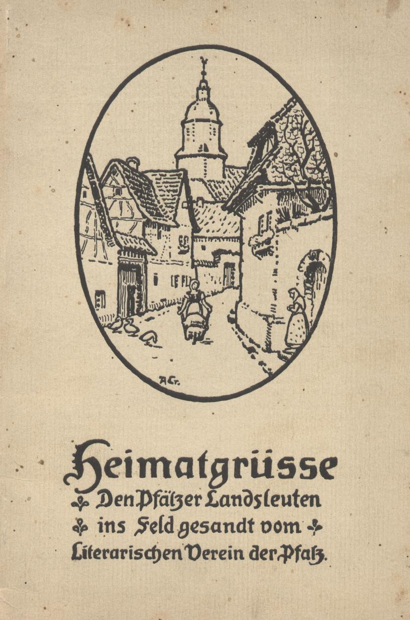 August Croissant, Buchcover mit einer Zeichnung von ihm